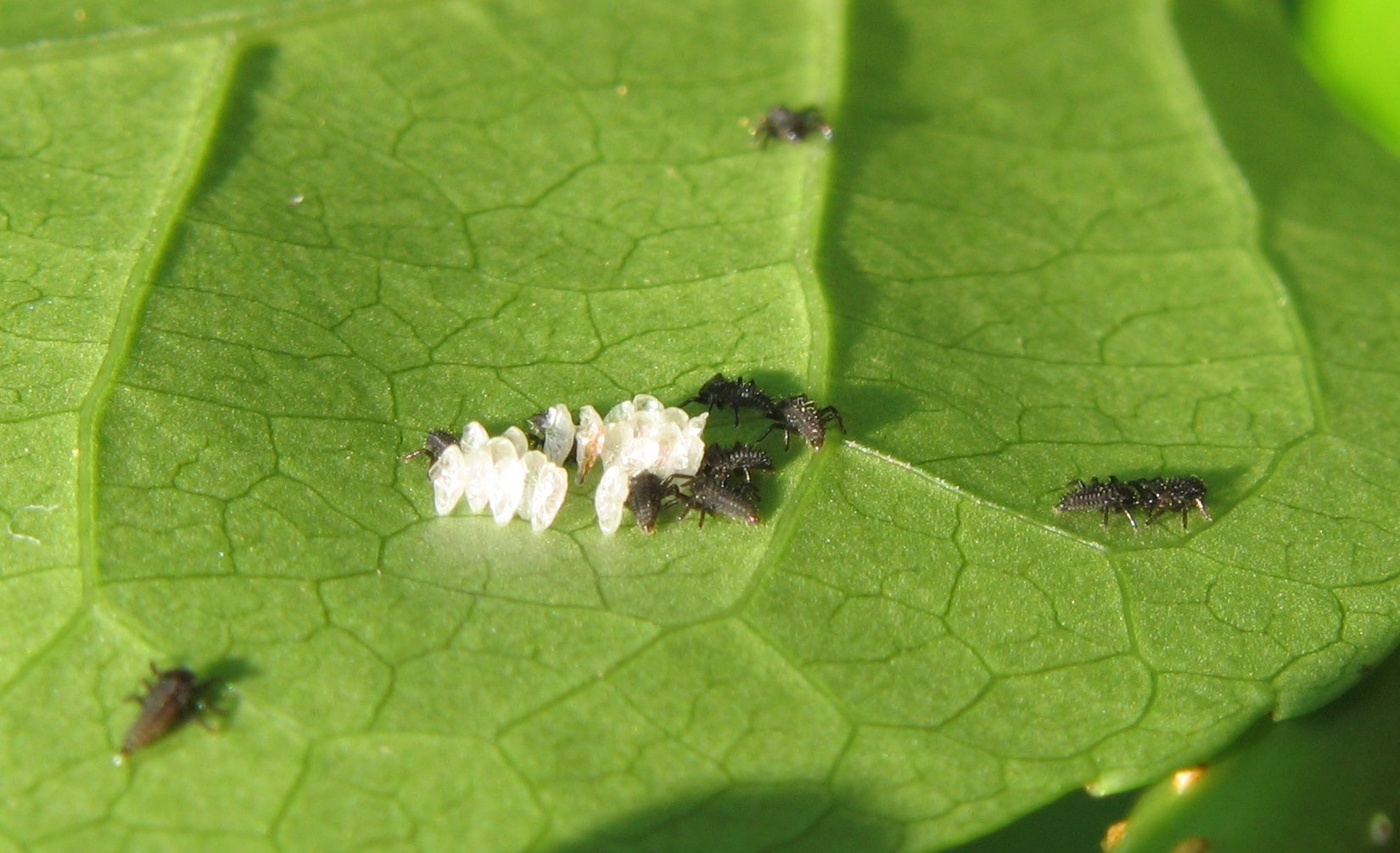 Larves de coccinelles sortant de leurs oeufs